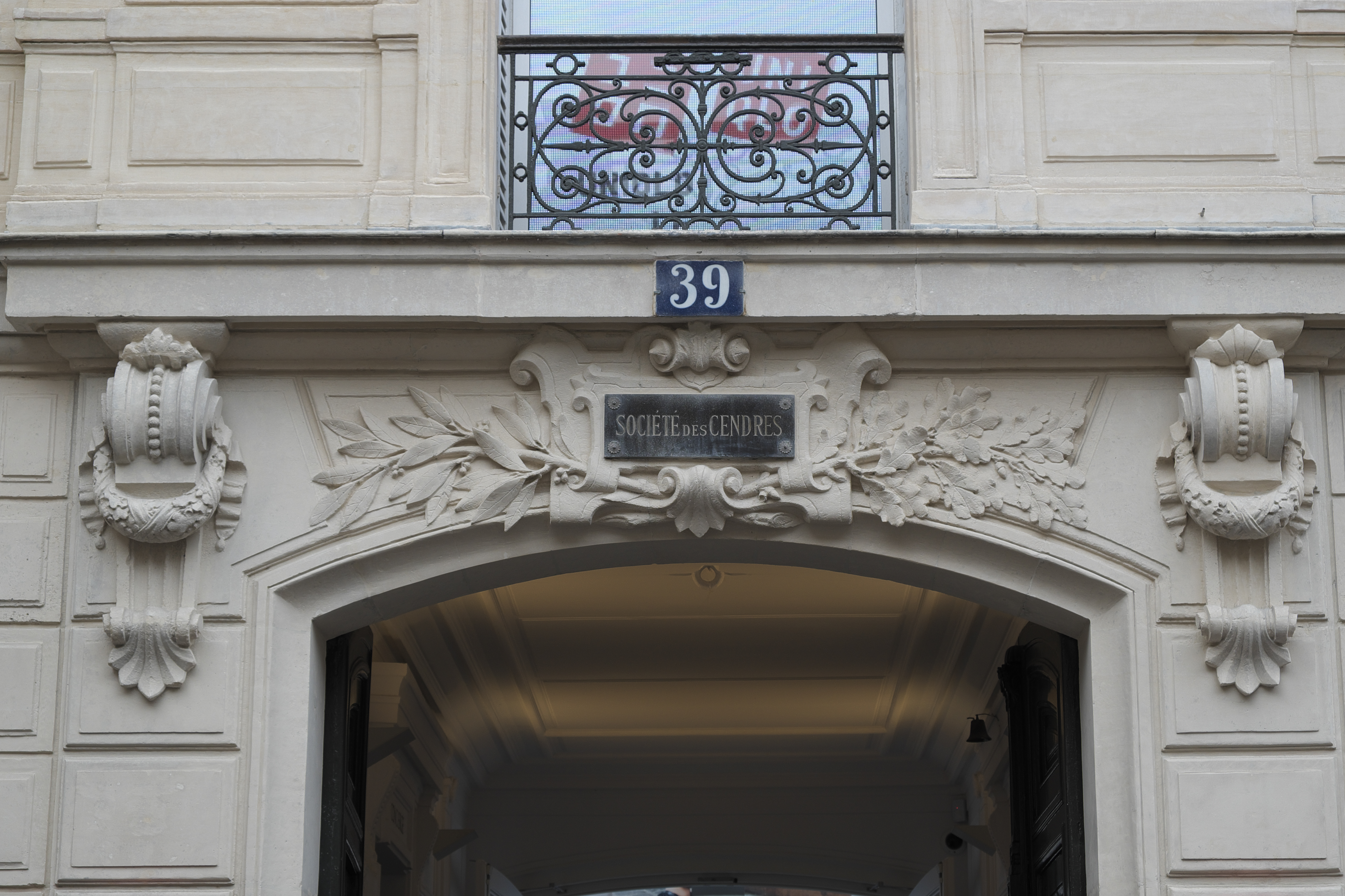 Ehemaliges Gebäude der Société des Cendres in der Rue des Francs-Bourgeois Nr. 39 im 4. Arrondissement in Paris, in dem seit 2014 ein Modegeschäft eingerichtet ist